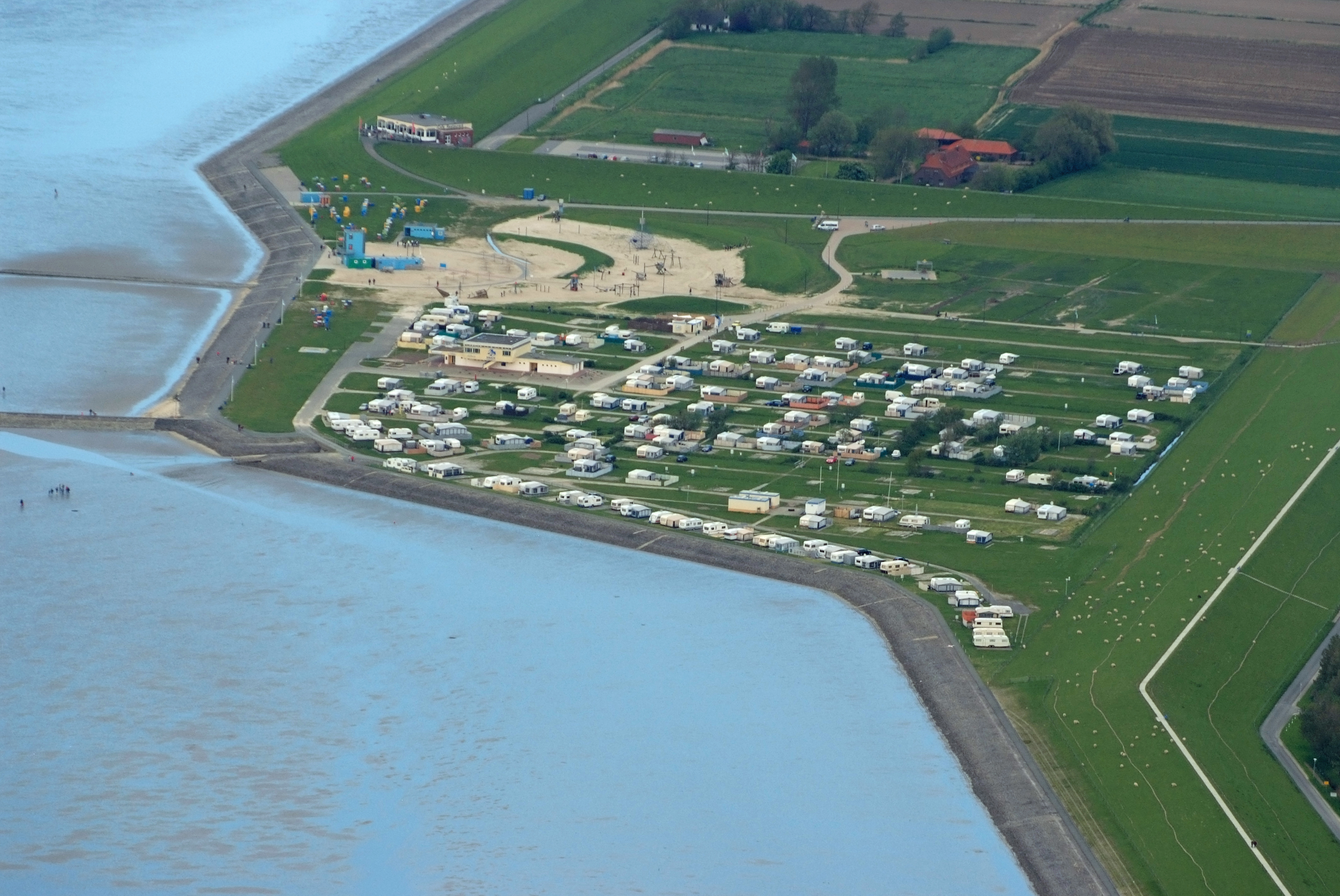 Tossens Strandbad Fotoflug vom Flugplatz Nordholz-Spieka über Bremerhaven, Wilhelmshaven und die Ostfriesischen Inseln bis Borkum